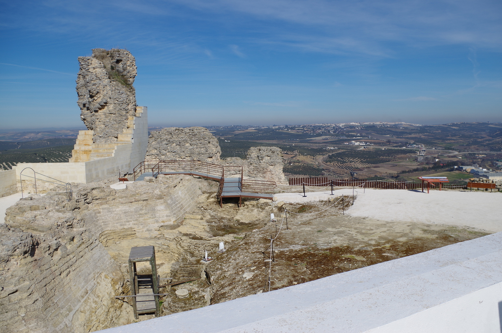 Aguilar de la Frontera (España).